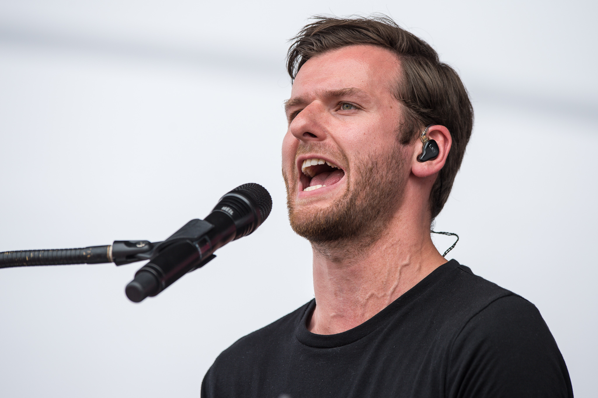 Daniel Grunenberg,Festival,Glasperlenspiel,Konzert,Livekonzert,Livemusik,Mainstage,Musik,Open Beatz 2016